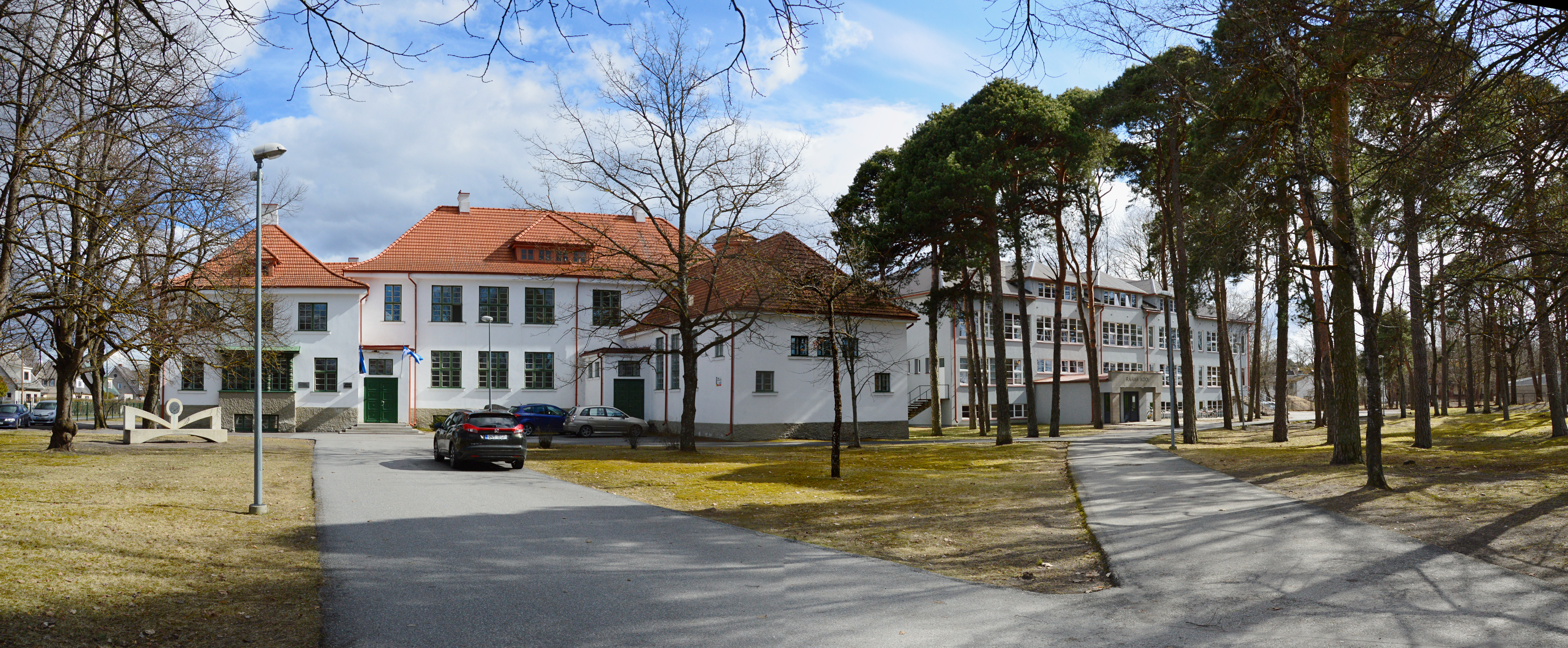 Rääma kool